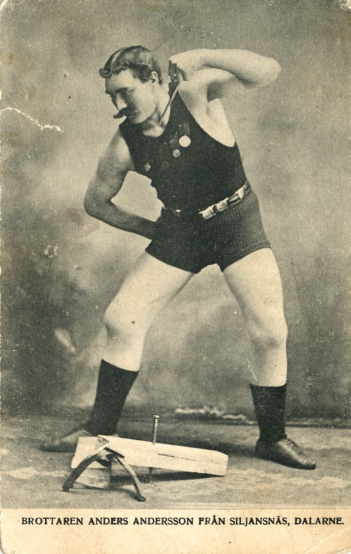 Siljansnäs-Anders slår en spik genom en tjock planka. Notera den vridna hästskon på marken.